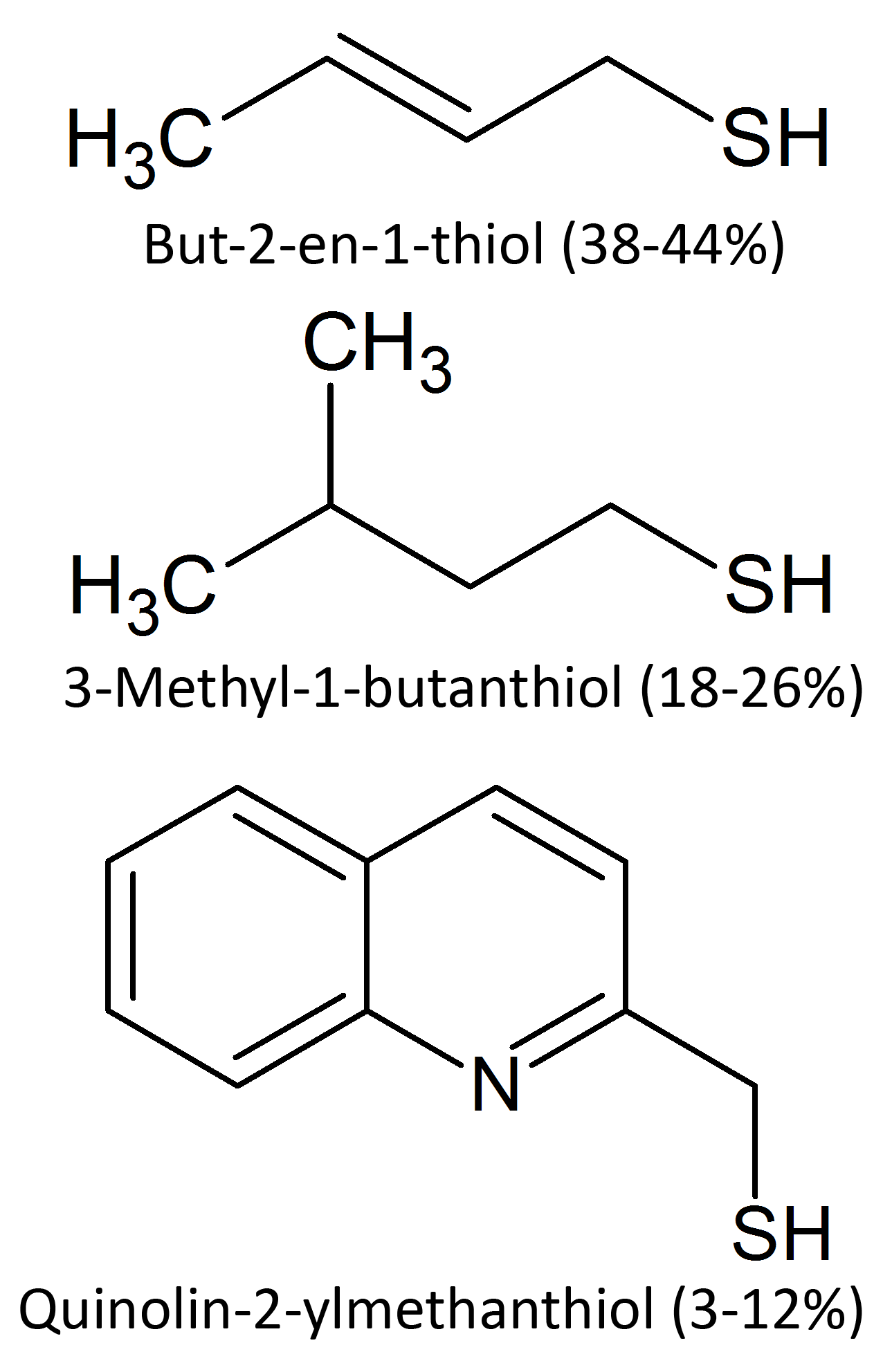 Thiole im Drüsensekrets des Stinktiers Die Thiole sind verantwortlich für den Gestank des Sekrets.